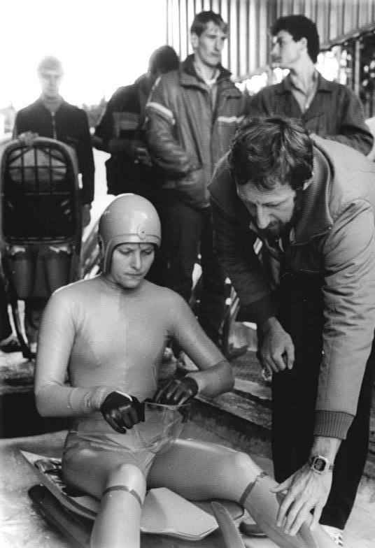 Cerstin Schmidt ADN-ZB Schaar A-16.10.1987-Bez. Suhl: Rennschlitten-Saisonauftakt-Auf der Kunsteisbahn in Oberhof eröffneten die Rennschlittensportler der DDR ihre Wettkampfsaison mit den Wettbewerben um den Pokal "Schnelle Kufe". Vorjahressiegerin und Weltmeisterin Cerstin Schmidt (SC Traktor Oberwiesenthal) voer dem Start mit ihrem Trainer Wilfried Jüchert.